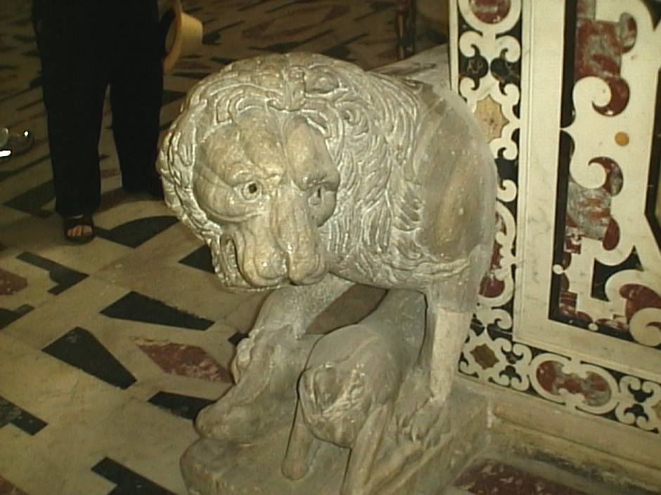 Leone marmoreo, Maestro Guglielmo (XII secolo), Cattedrale di Cagliari